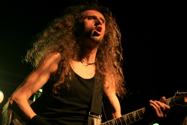 Marek Pajak of Vader